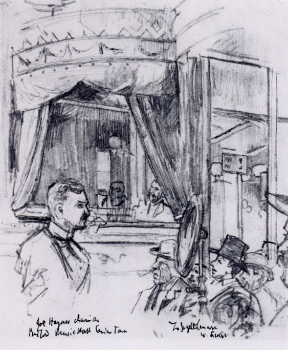 Walter Richard Sickert (31 May 1860 – 22 January 1942). Joe Haynes, chairman.